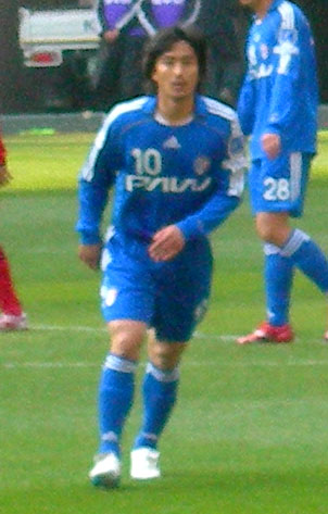 안정환의 경기 모습. 2007년 4월 8일 서울월드컵경기장에서 열린 서울 대 수원 경기 후반전. 직접 촬영.